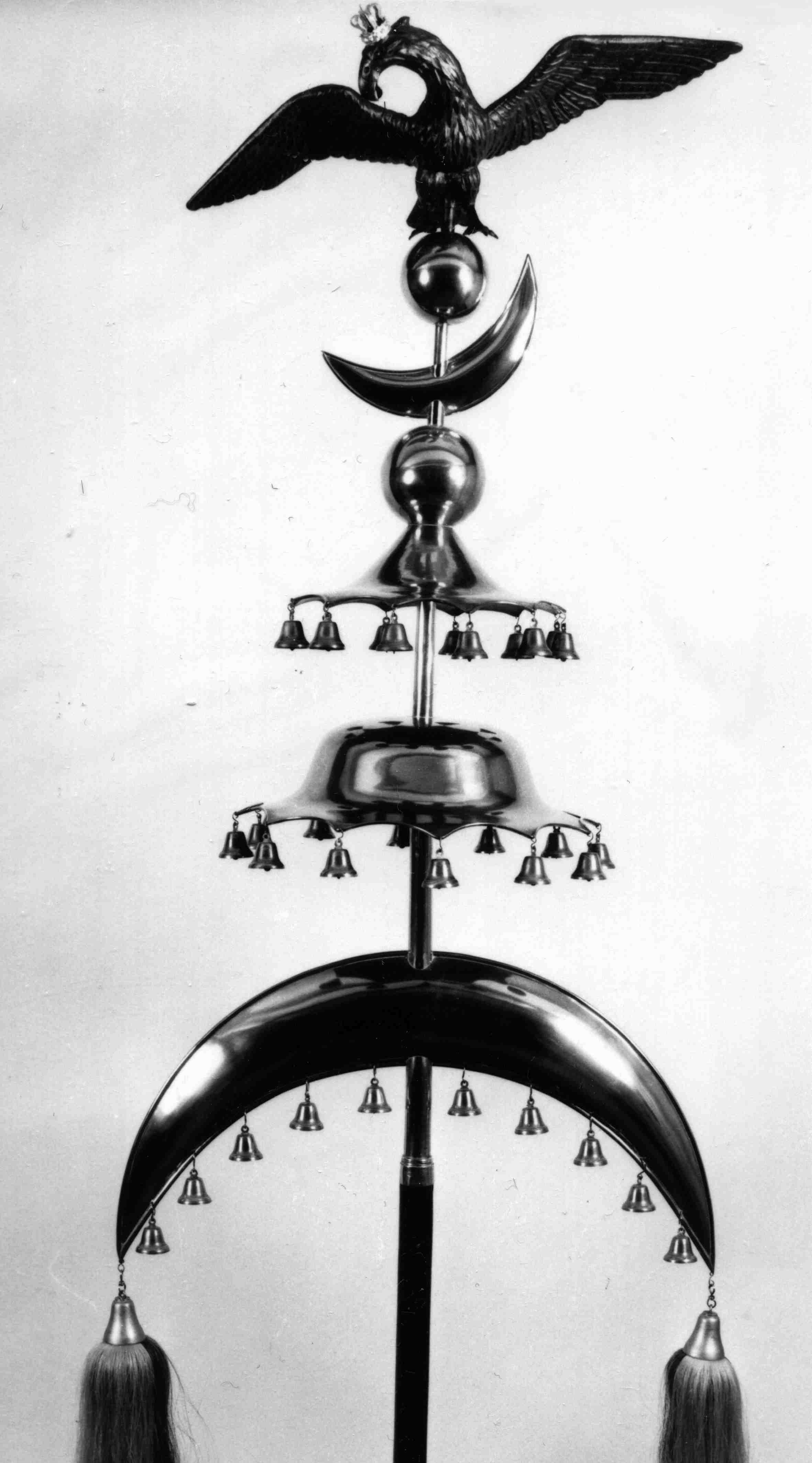 Schellenbaum des Musik Vereins von Calcar. Sein genaues Alter ist unbekannt. Die Verwendung des Halbmond-Symbols lässt darauf schließen, dass er aus dem 19. Jahrhundert stammt, da der Halbmond aufgrund einer kaiserlicher Verfügung aus dem Jahre 1902 verboten wurde.